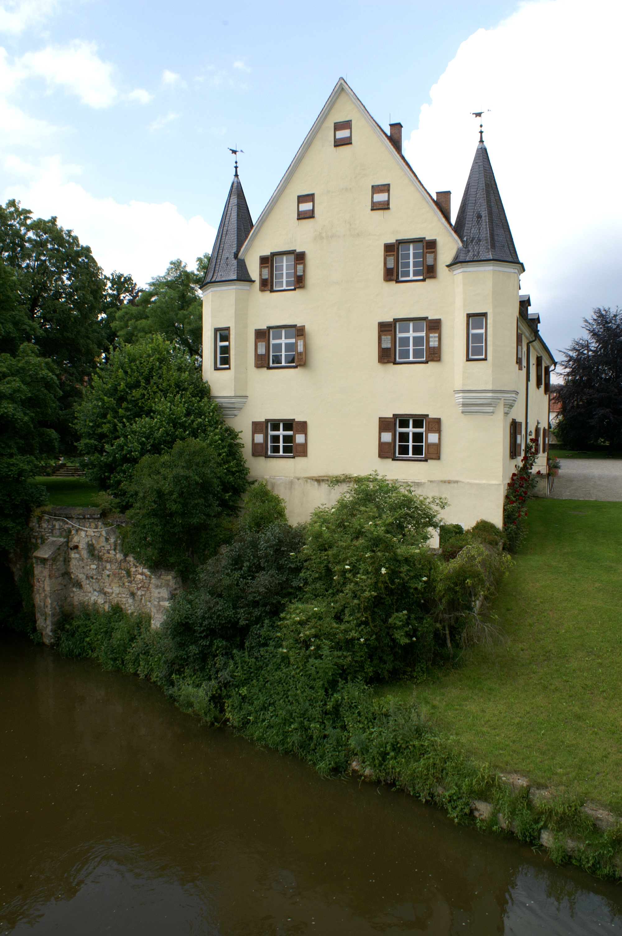 Schloss Zwiefaltendorf an der Donau wurde um 1660 erstmals urkundlich erwähnt. Bereits im 11. Jahrhundert stand hier eine Wasserburg, die Herzog Ulrich von Württemberg niederbrennen ließ